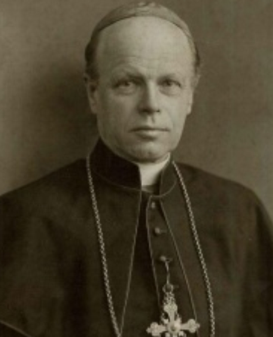 Bischof Sigismund Felix von Ow-Felldorf (*1855-1936), Bischof von Passau 1905 -1936